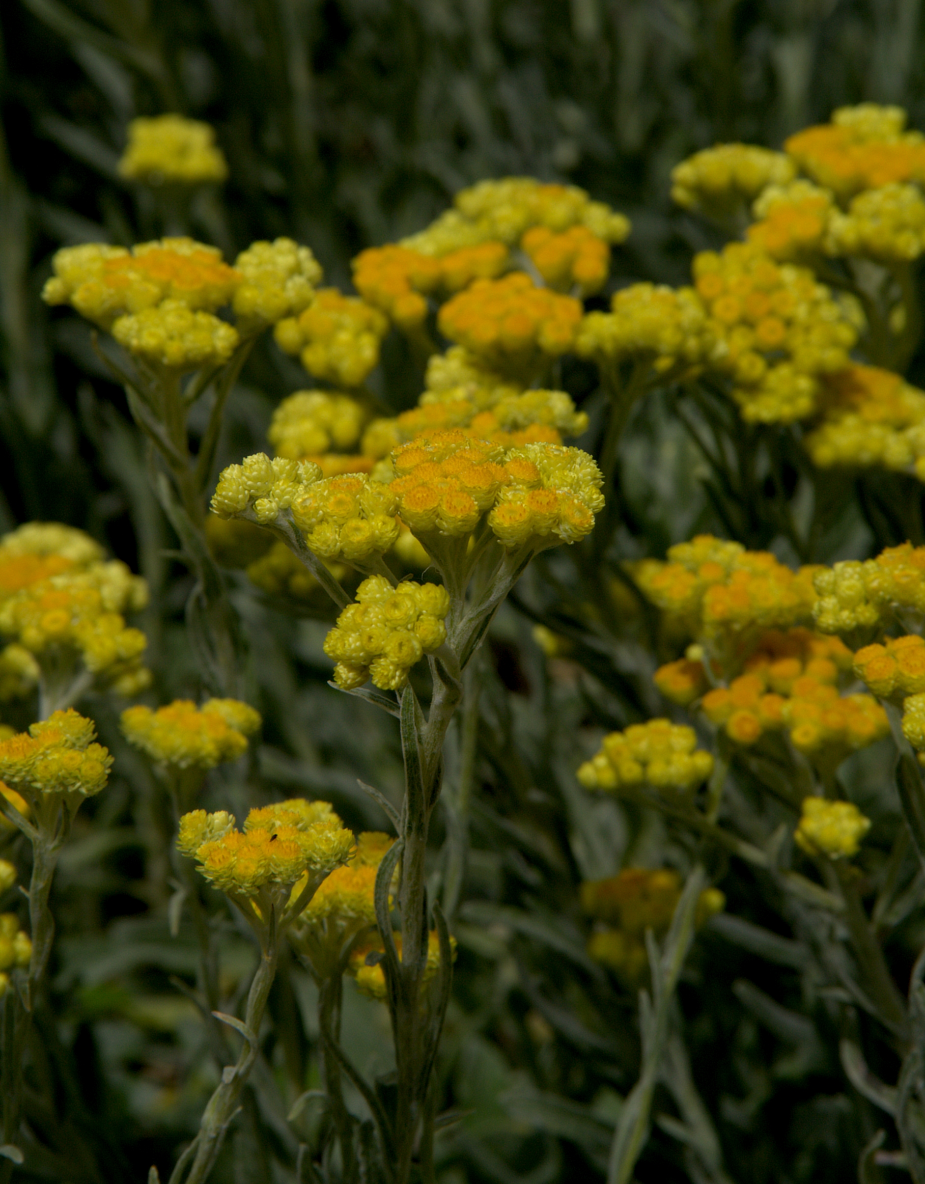 Helichrysum arenarium. Botaniska trädgården i Uppsala.